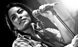 Cantante chilena Anita Tijoux.